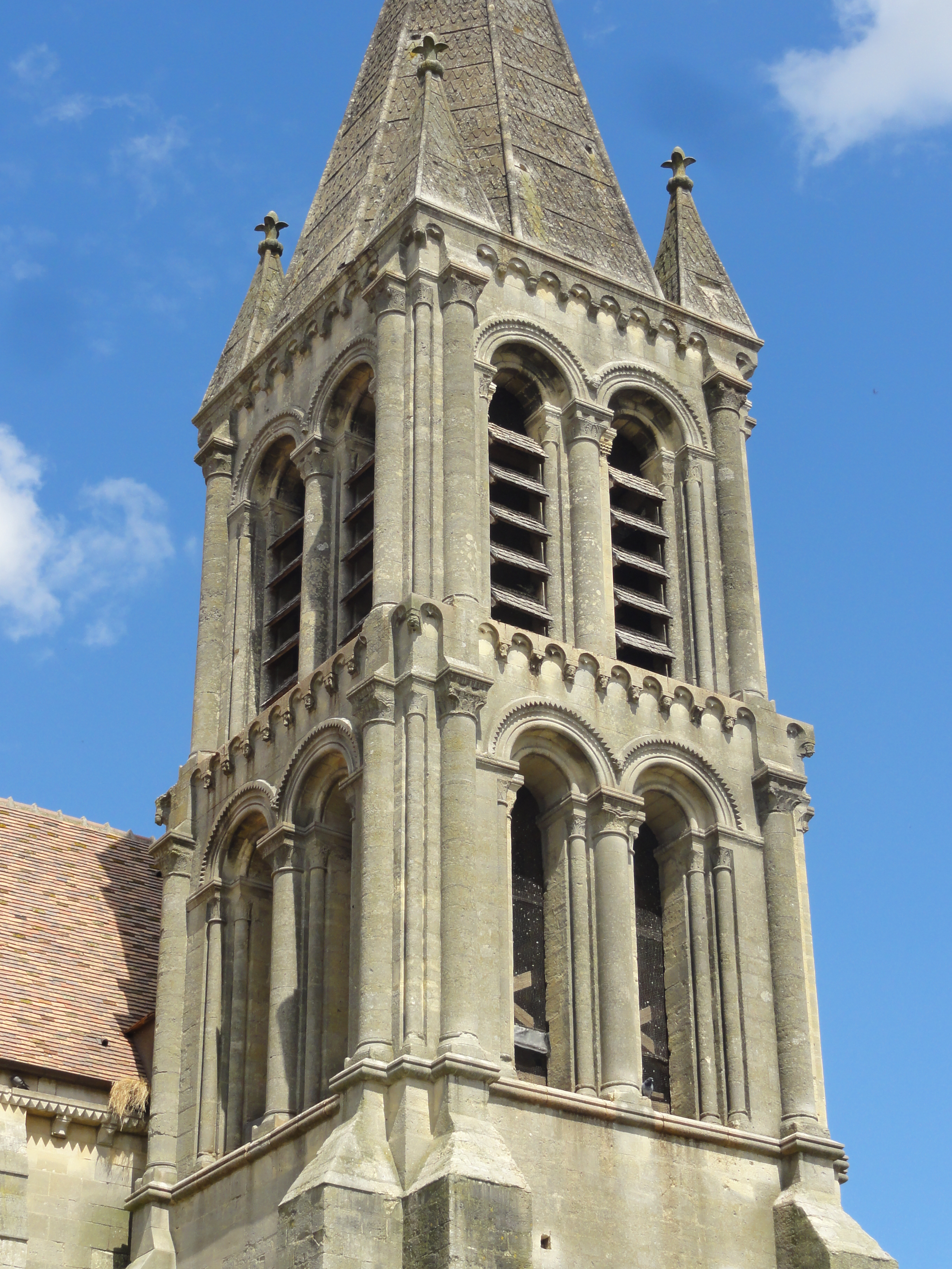 Clocher.